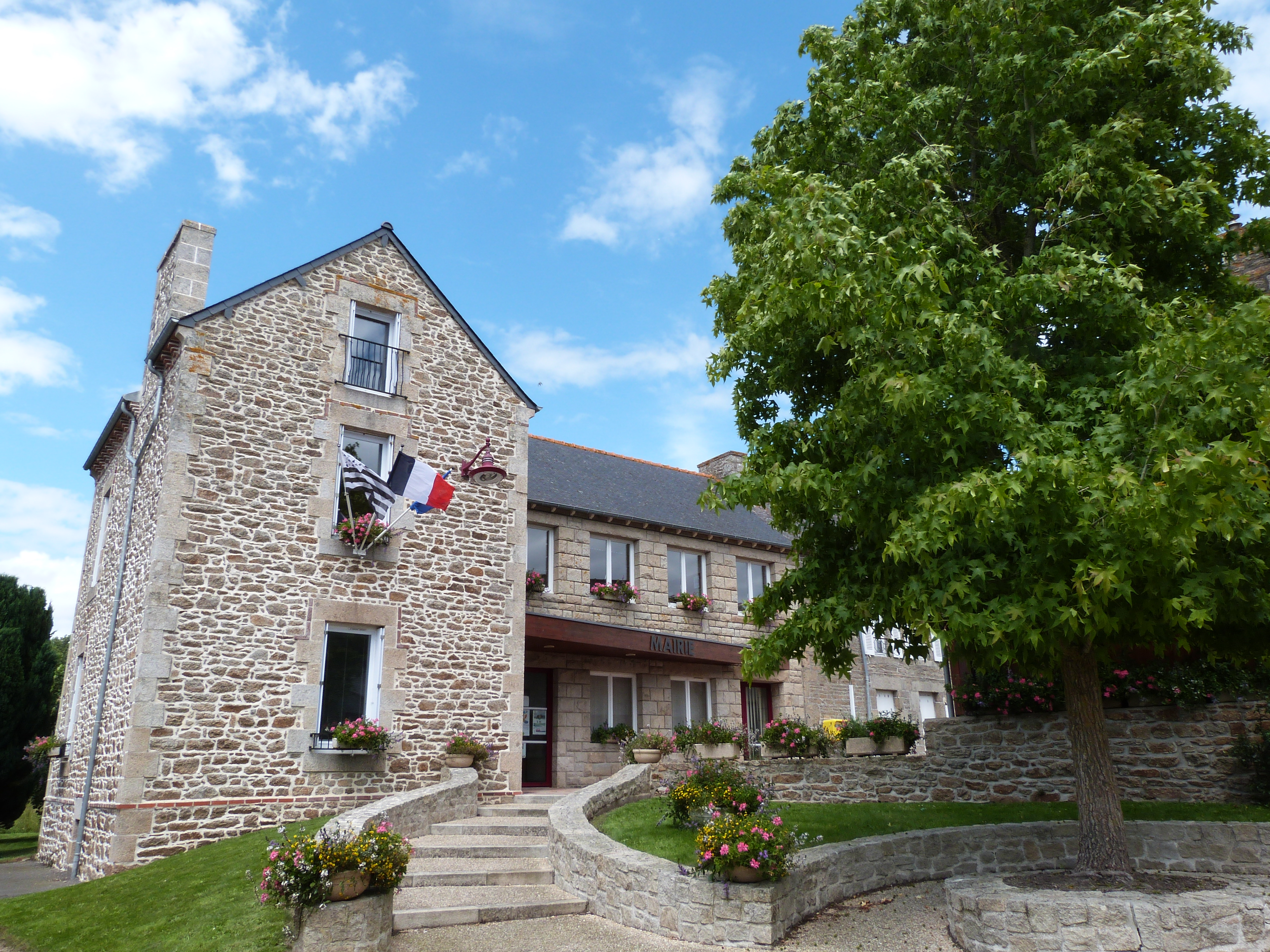 Mairie de Saint-Trimoël